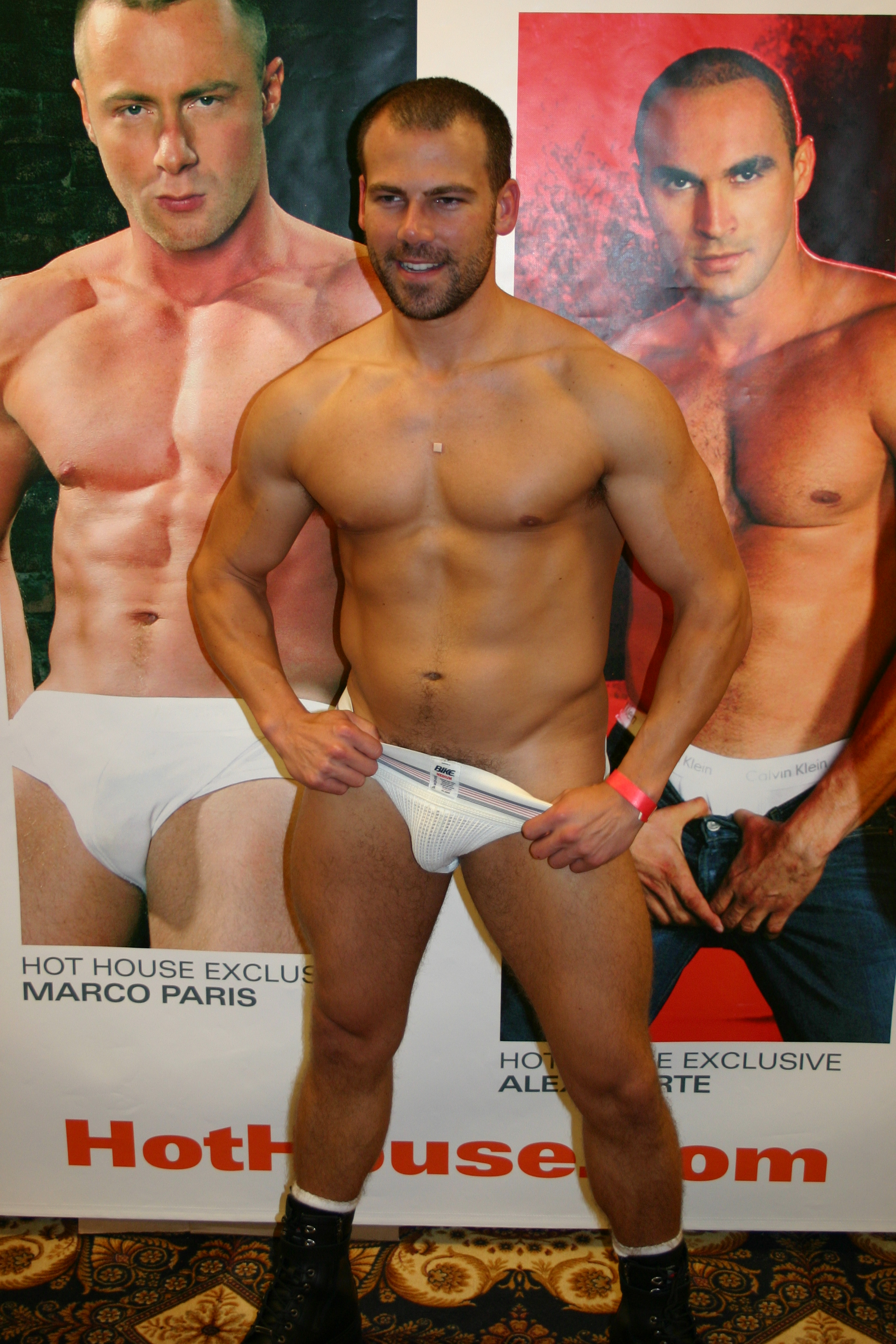 IML2006-LM-002